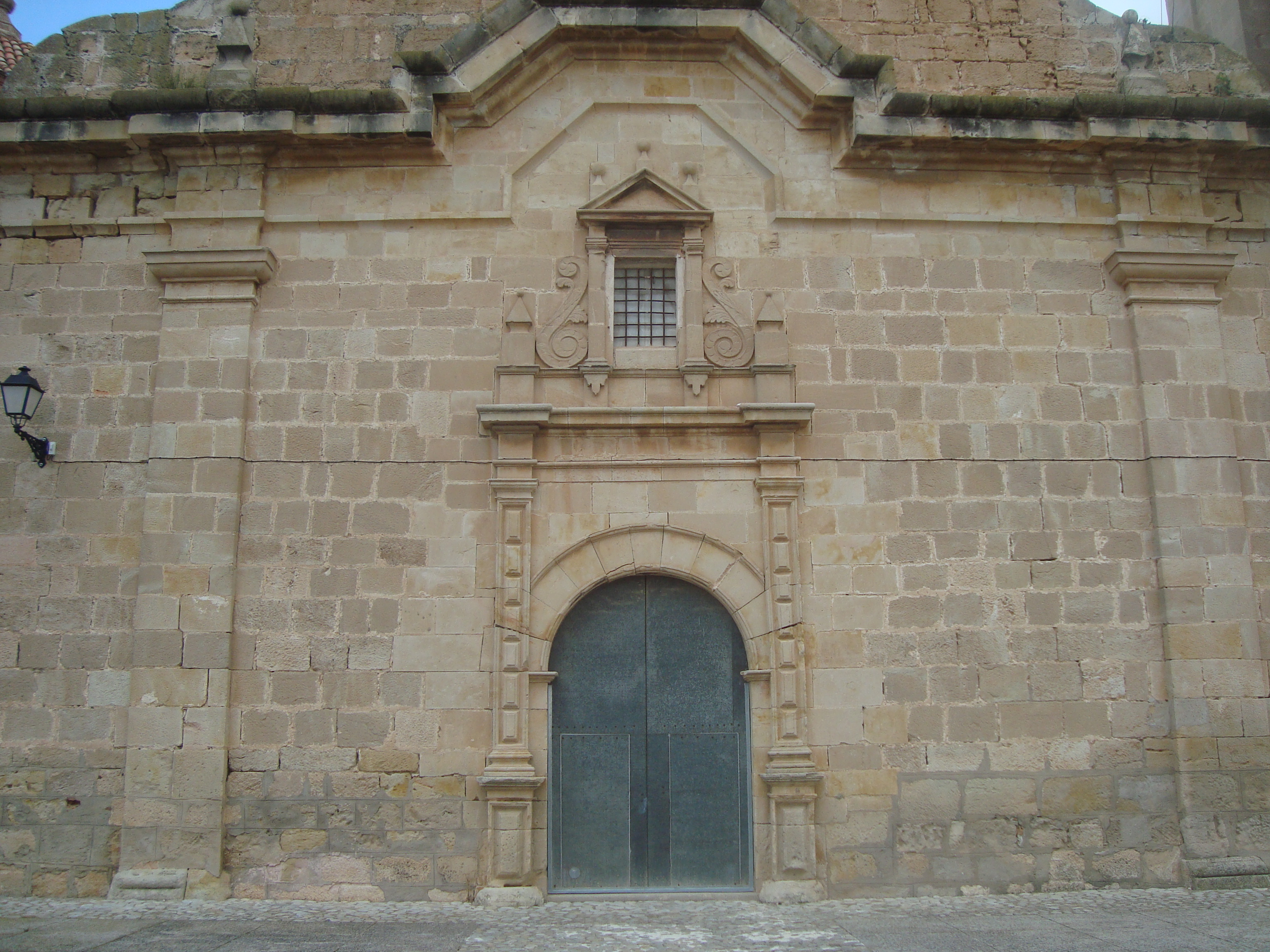 Fachada de la Parroquia de San Lorenzo (Aguaviva, Teruel)